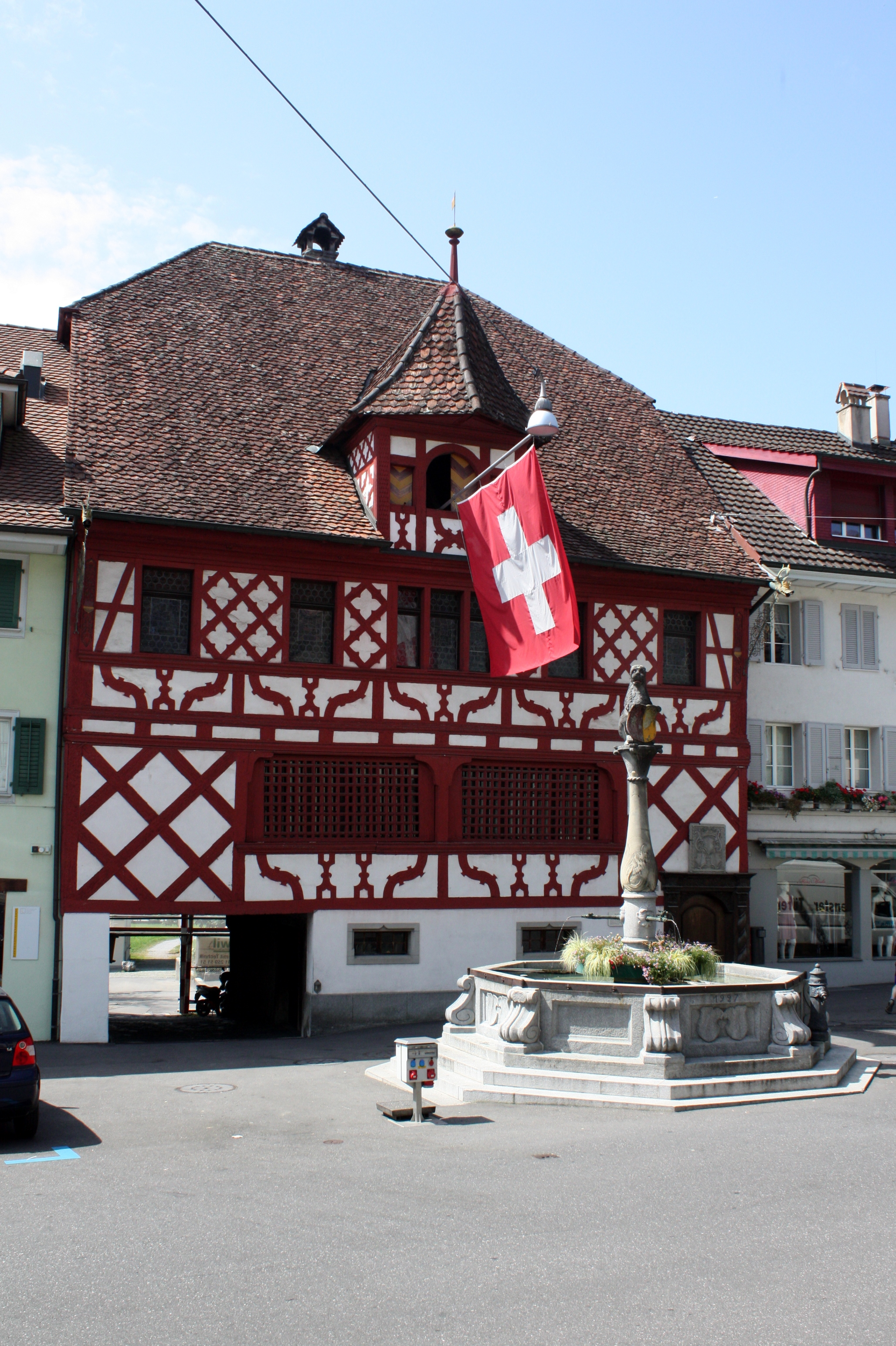 Rathaus mit Brunnen Im Städtchen Sempach